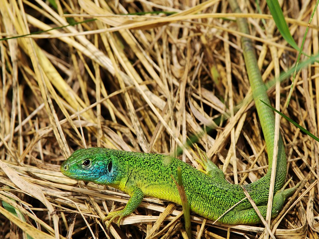 Östliche Smaragdeidechse (Lacerta viridis); aufgenommen im Kaiserstuhl